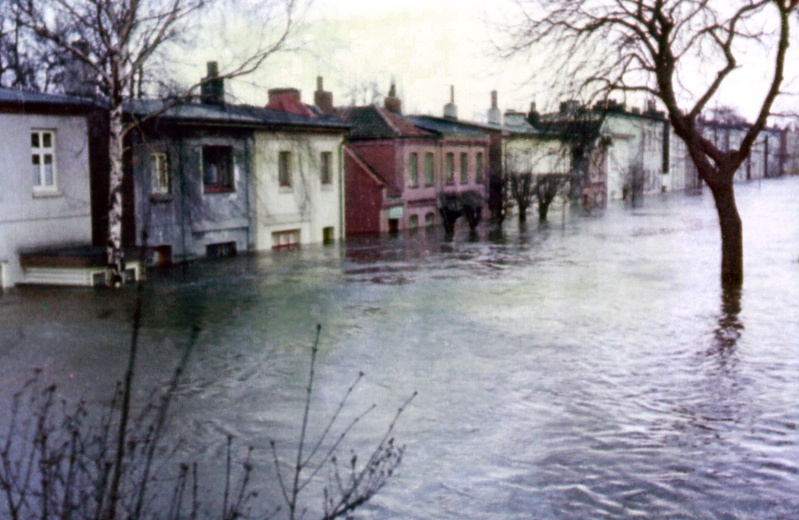 Sturmflut 1962 in Wilhelmsburg